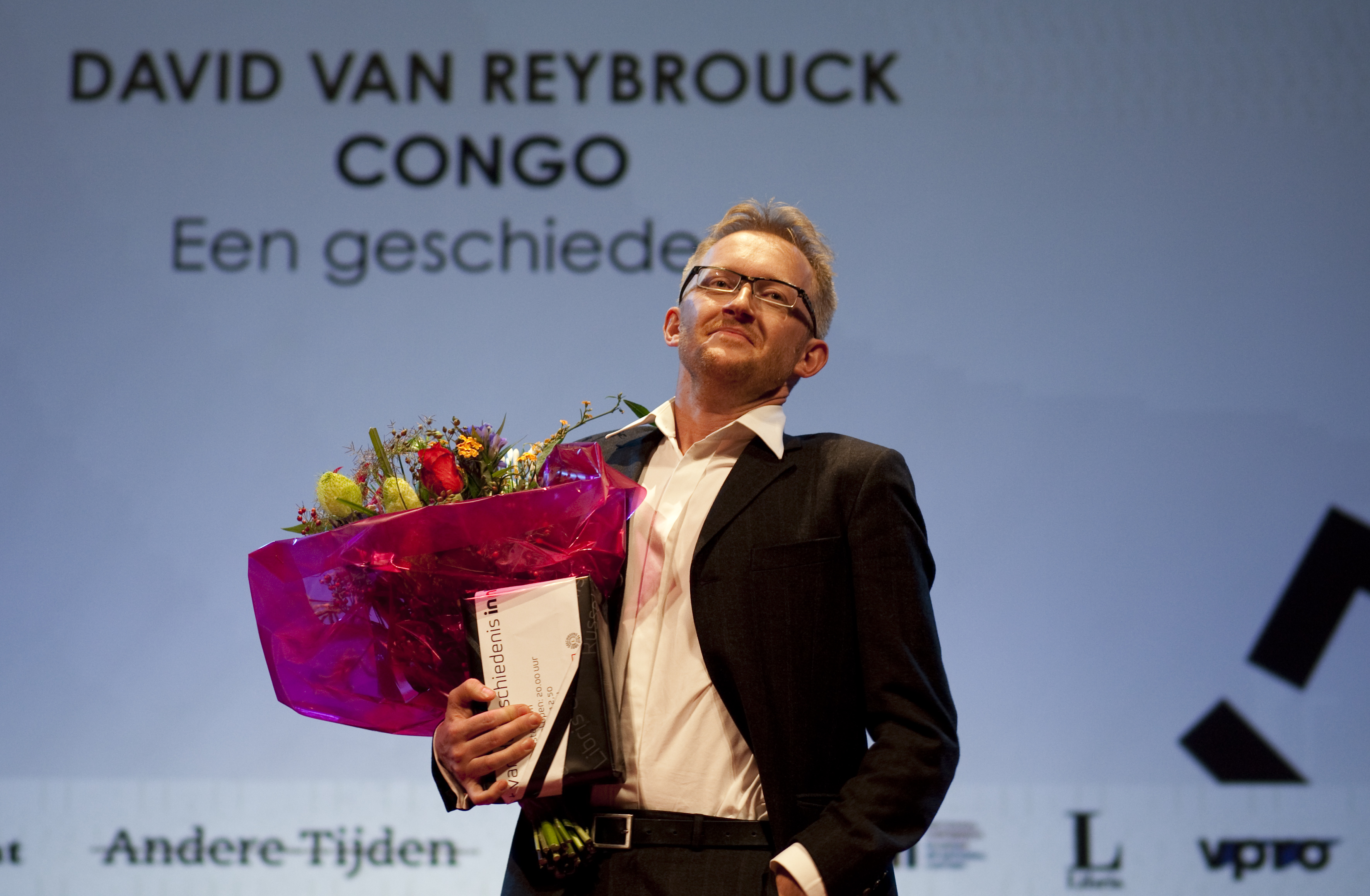 David Van Reybrouck krijgt Libris Geschiedenisprijs 2010